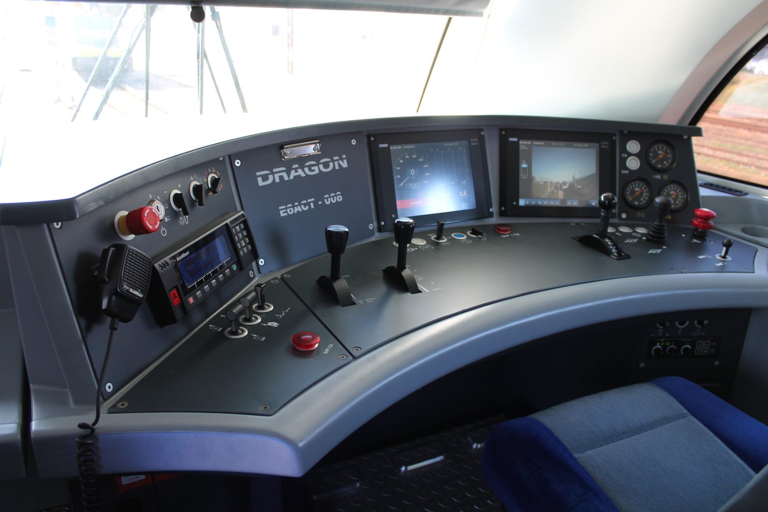 Kabina w elektrowozie E6ACT-008 podczas targów Trako 2015. The making of this document was supported by Wikimedia Polska Association, within Wikigrant no. WG 2015-34. English | polski | +/−